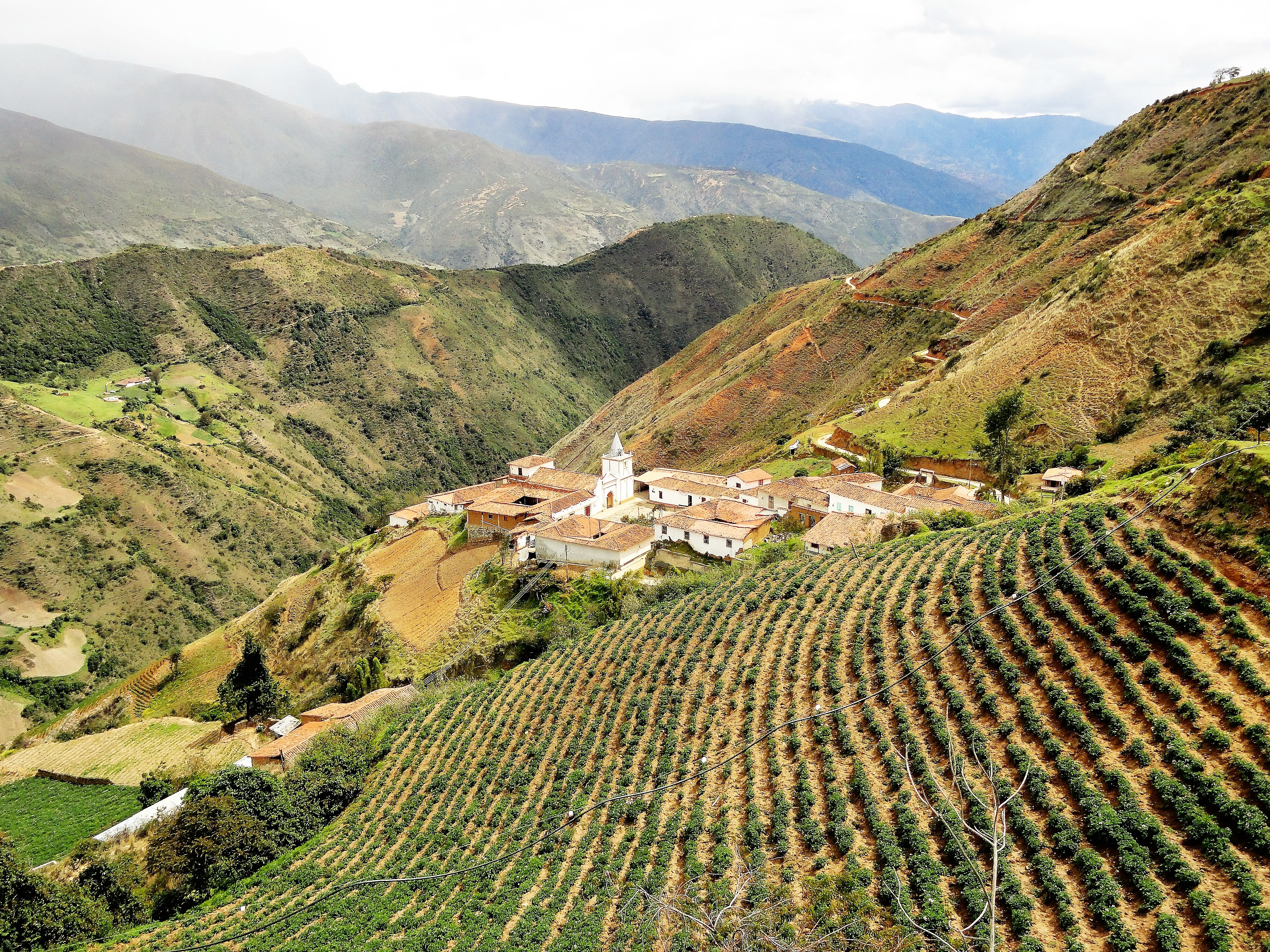 Los Nevados, centro poblado